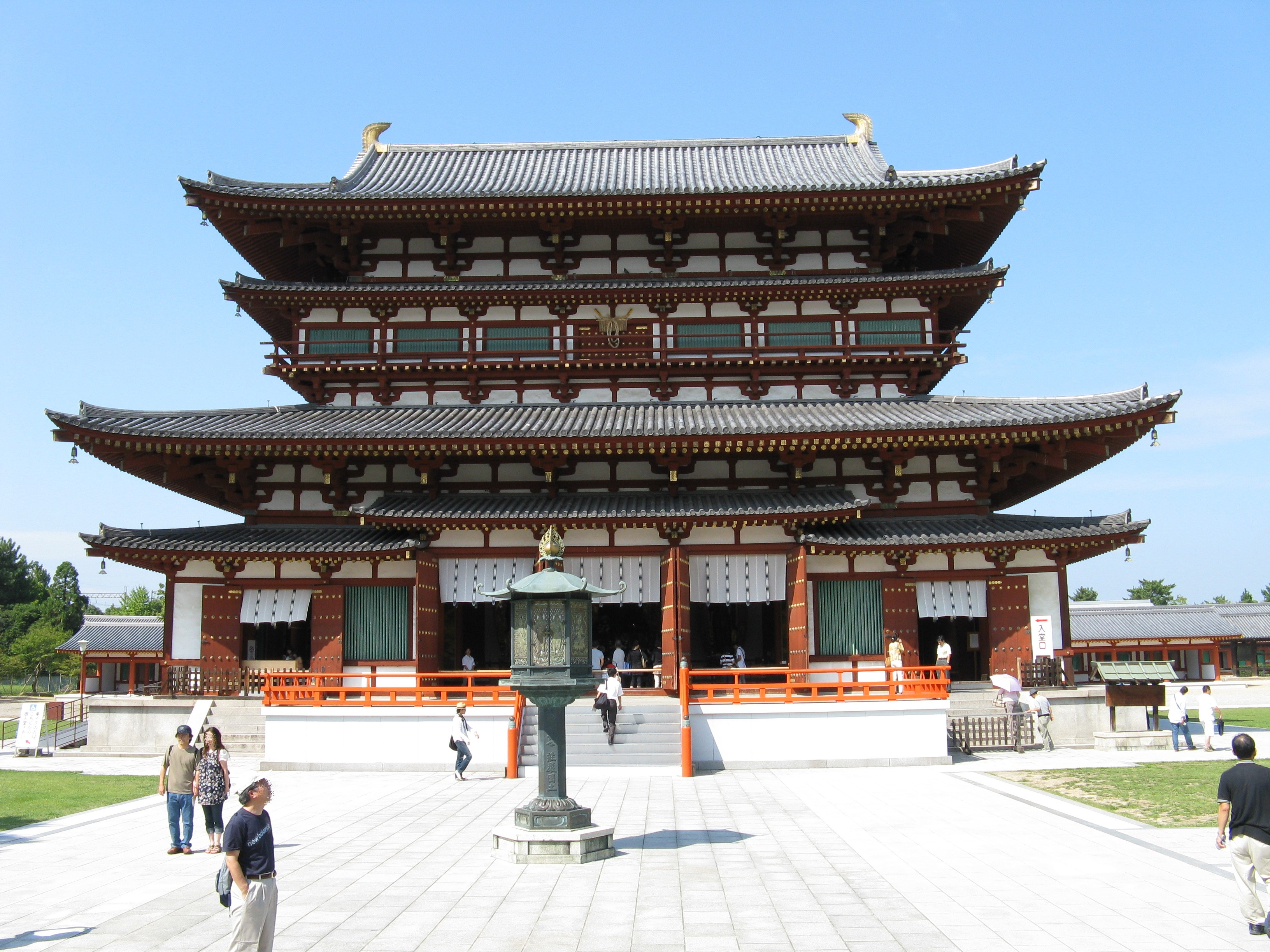 薬師寺 金堂